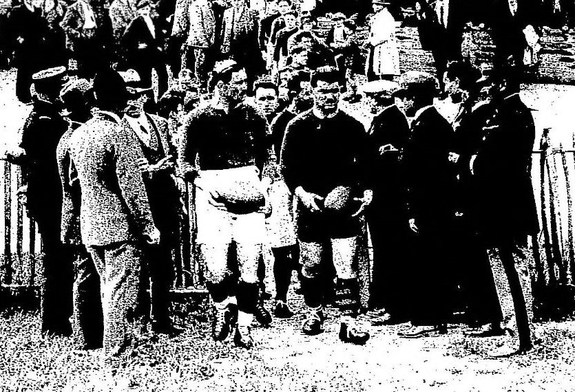 Agen-Quillan, championnat de France de rugby 1930, les deux équipes entrent sur le terrain (à G. capt. Ribère, à D. capt. Bédère).